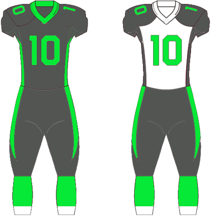 Uniforme esportivo Luverdense Overwhelming